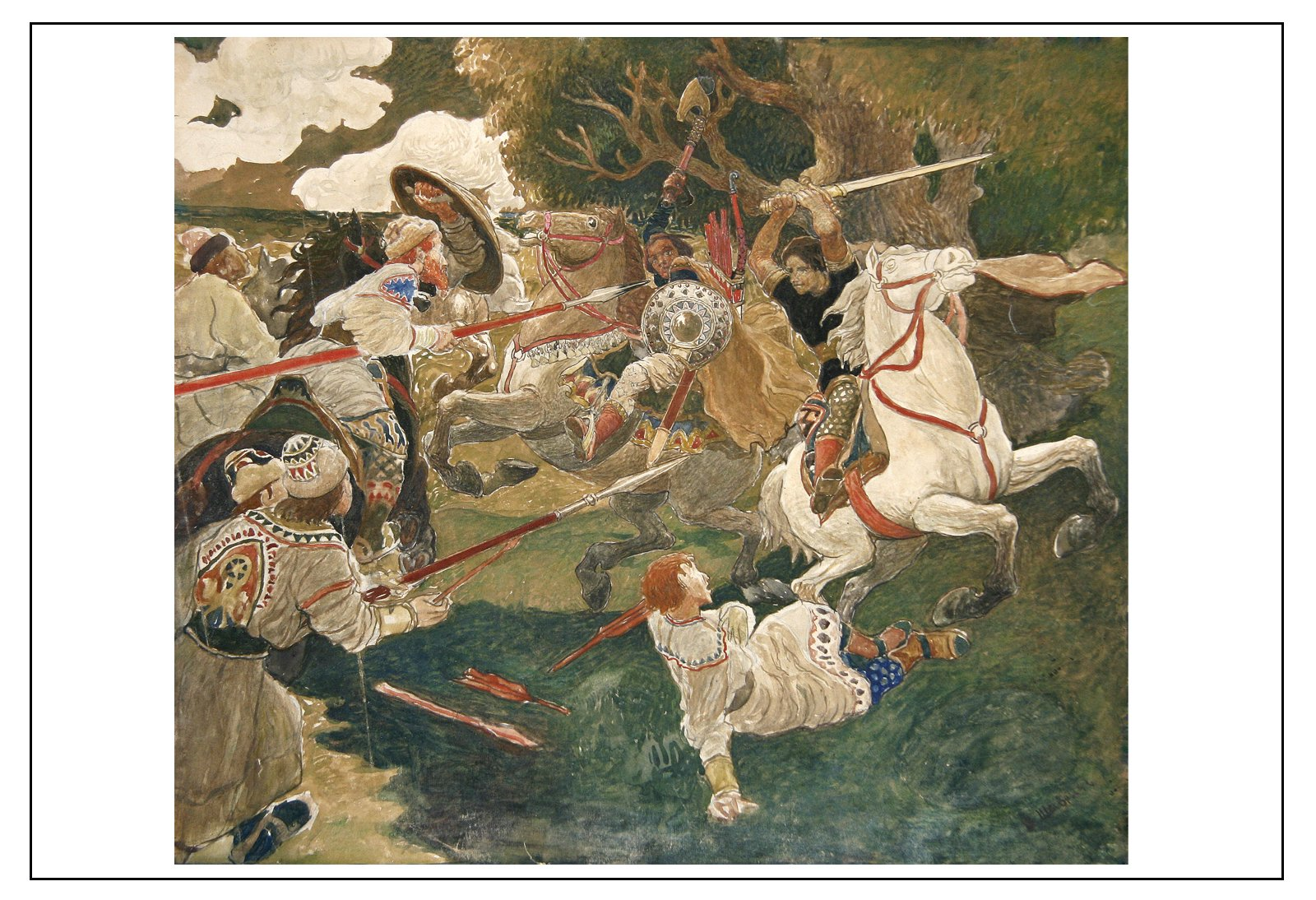 Битва. Сцена из русской истории. 1900-1910-e гг. Бумага, смешанная техника. 45,2х51,6.